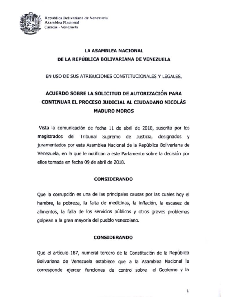 Acuerdo sobre la Solicitud de Autorización para continuar el proceso judicial al Ciudadano Nicolás Maduro, aprobado en Sesión Ordinaria de la Asamblea Nacional de Venezuela el 17 de abril de 2018